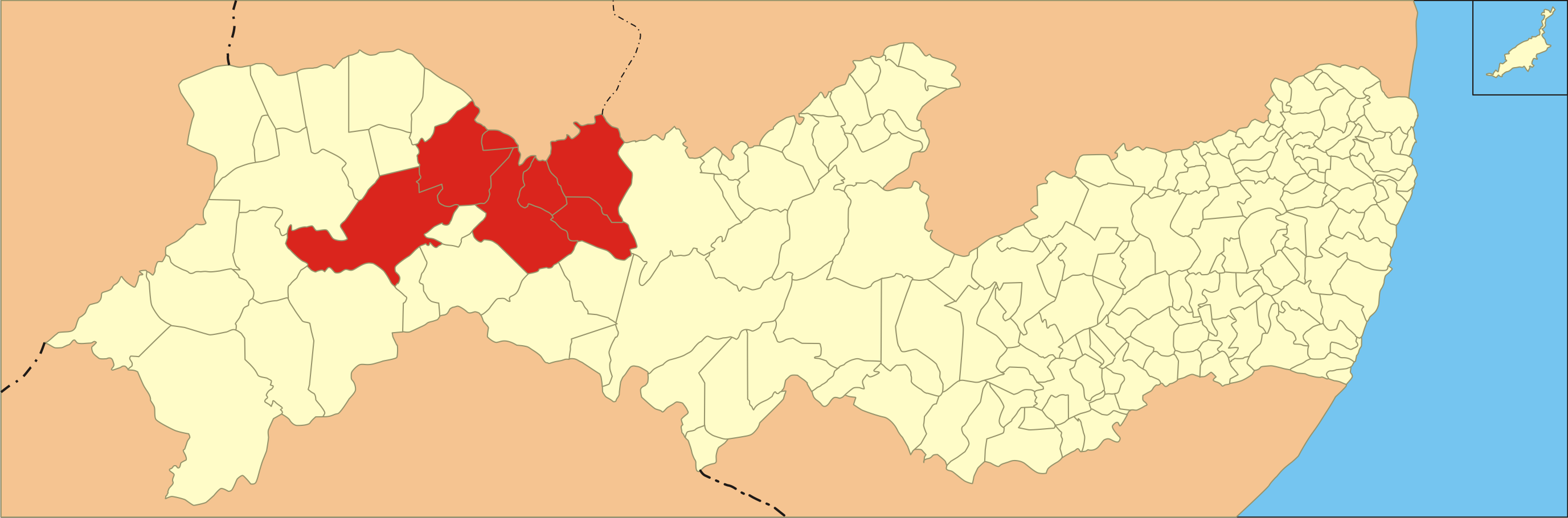 Localização da microrregião no estado de Pernambuco.